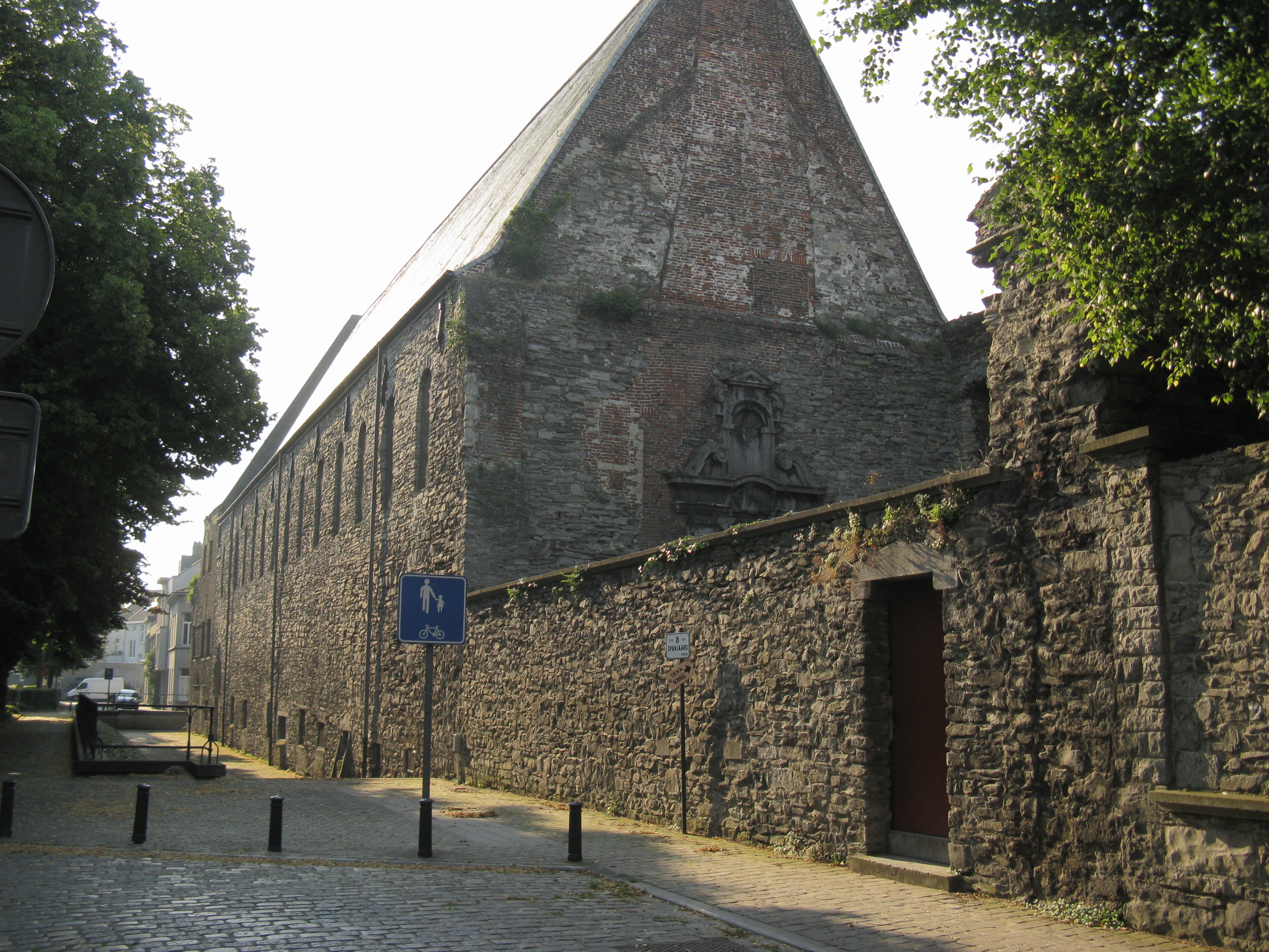 Ruïnes van de Sint-Baafsabdij, Machariuswijk, Gent